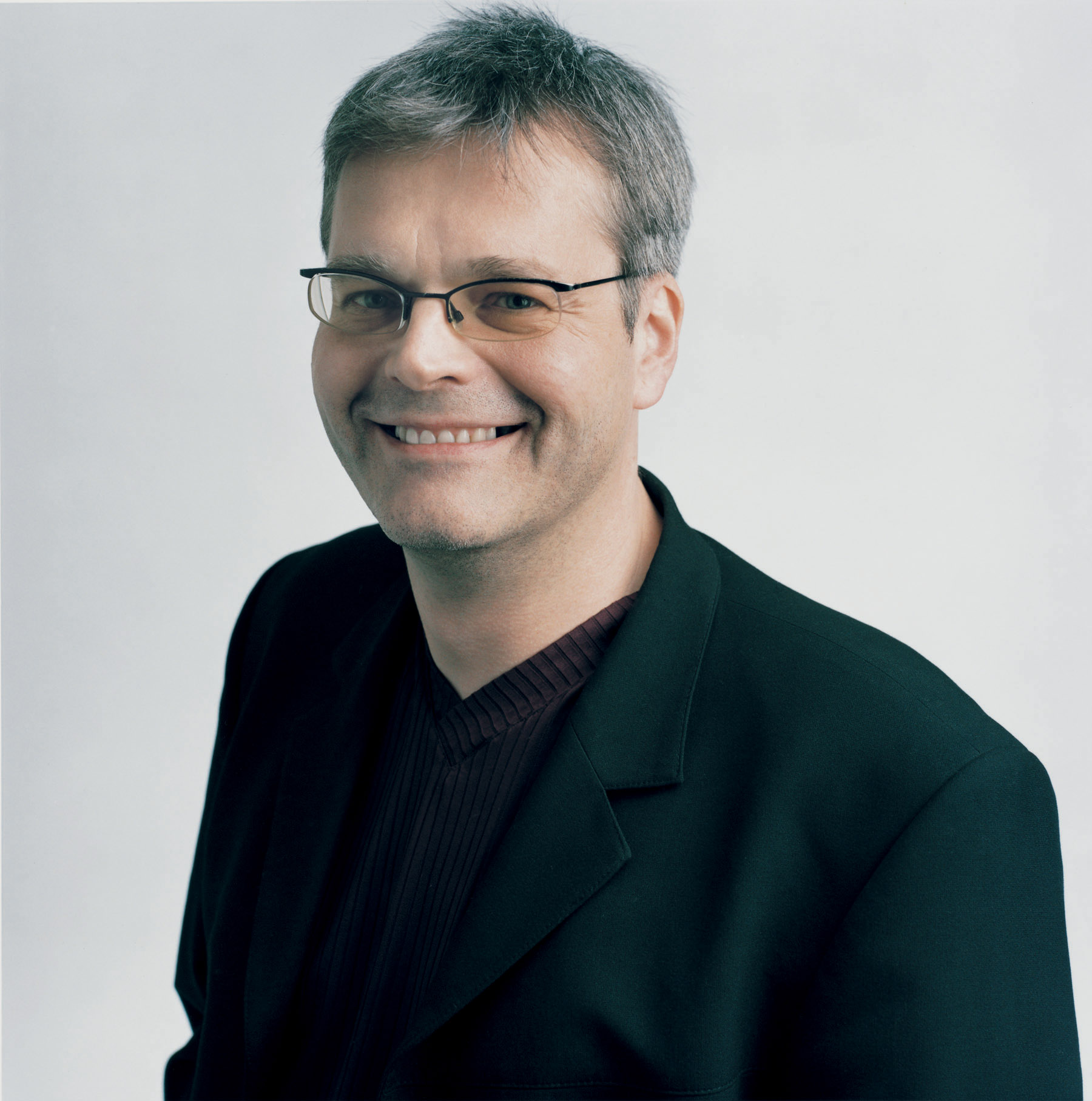 Martin Margulies. Wiener Landtagsabgeordneter und Mitglied des Wiener Gemeinderats (Die Grünen)